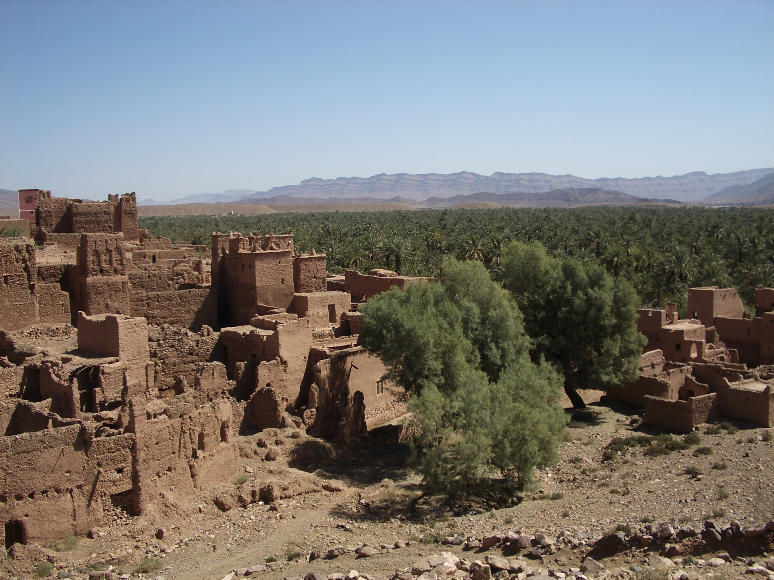 Casbah et palmeraie de la vallée du Draa, Maroc.